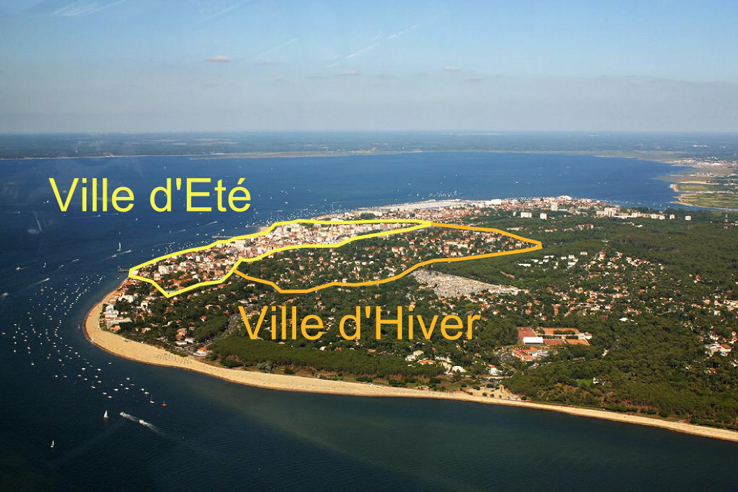 Localisation de la Ville d'Eté et de la Ville d'Hiver sur la commune d'Arcachon (Gironde, Aquitaine, France)